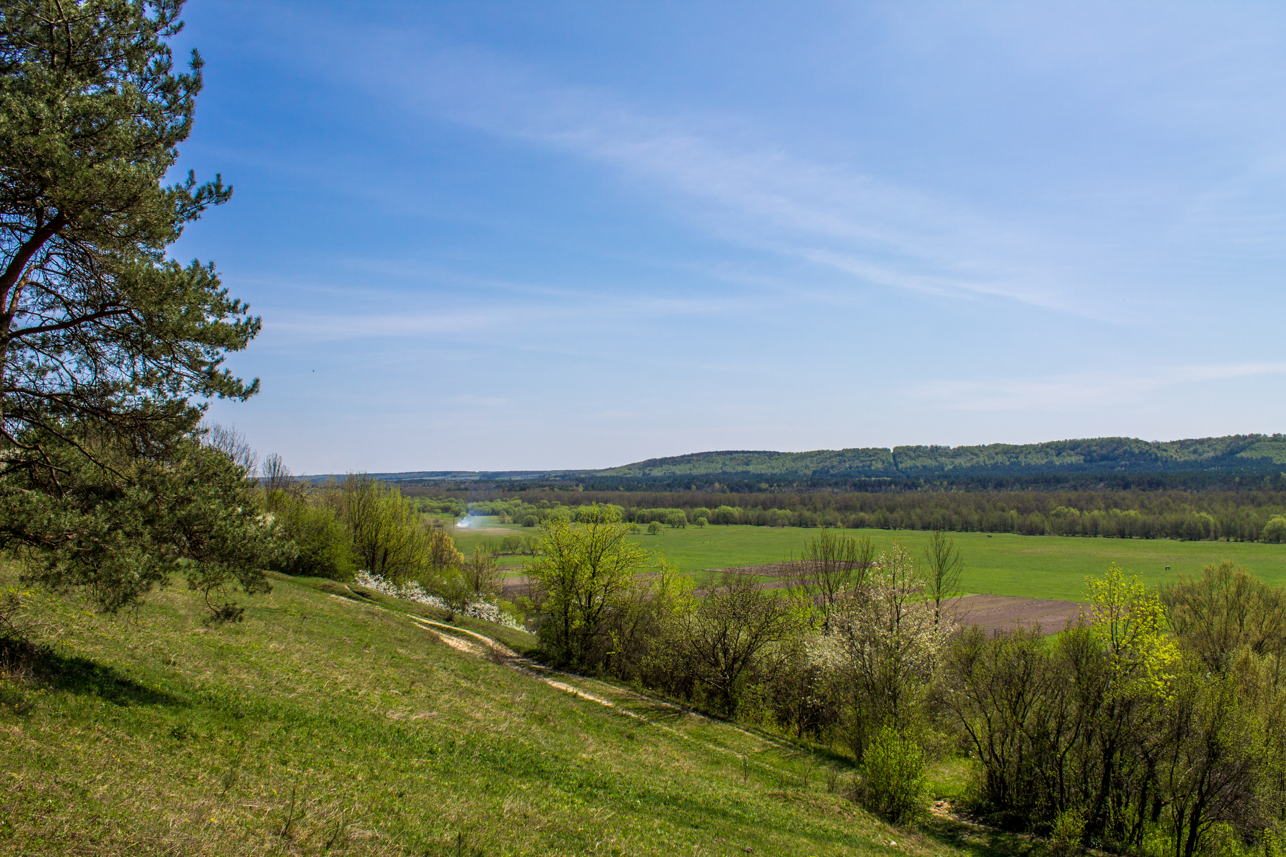 Дермансько-Острозький, Здолбунівський, Острозький